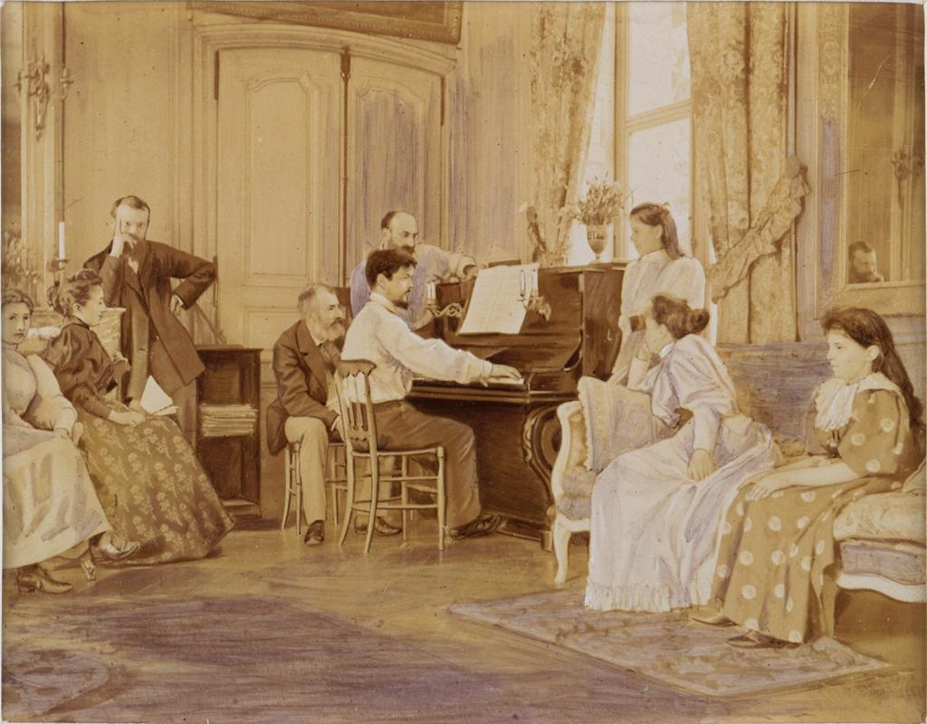 Claude Debussy au piano l'été 1893 dans la maison de Luzancy (chez son ami Ernest Chausson), De gauche à droite : Yvonne Lerolle, Mme Lerolle, Raymond Bonheur, Henri Lerolle, Ernest Chausson, Claude Debussy, Christine Lerolle, Mme Chausson, Etiennette Chausson.